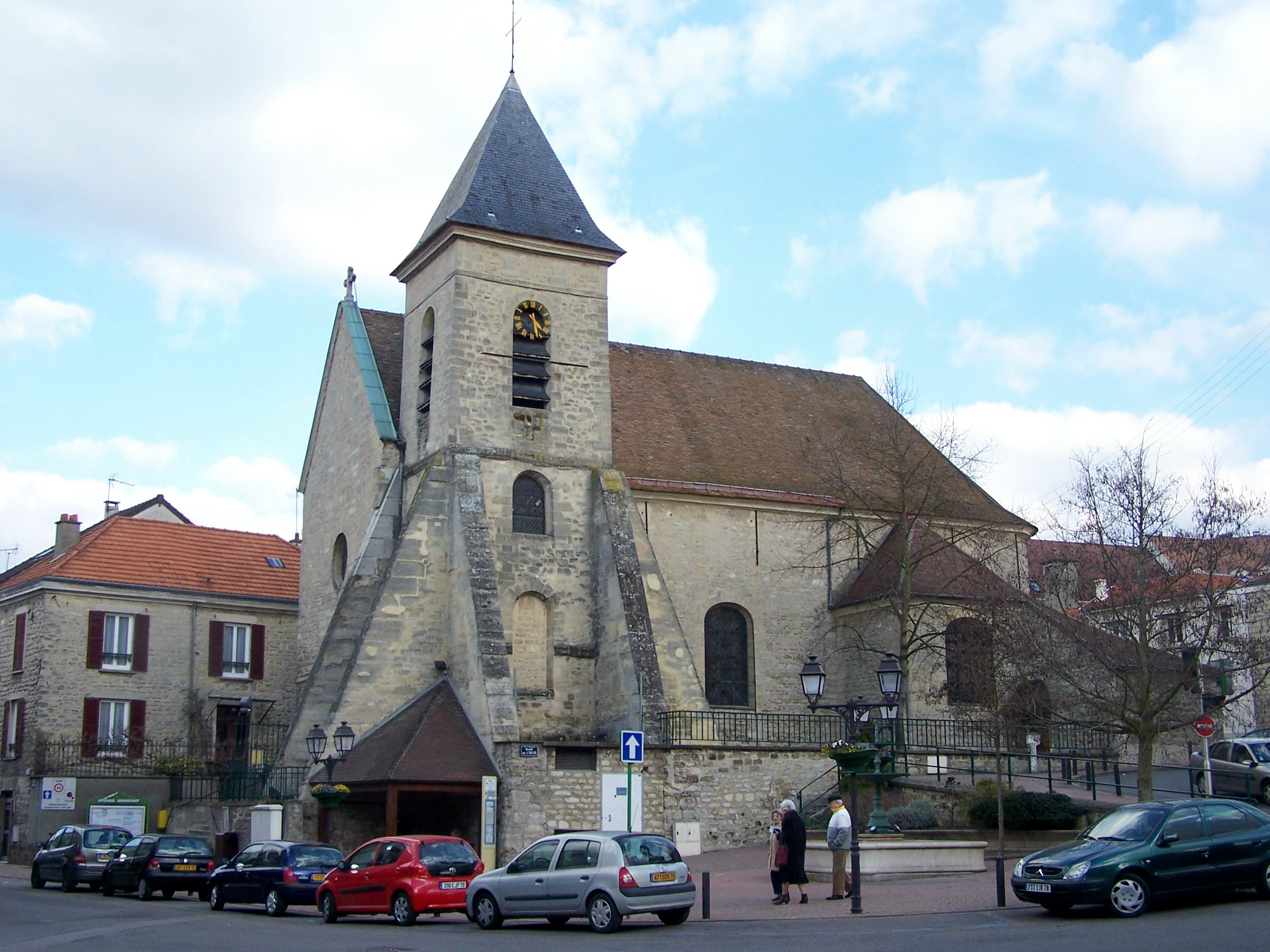 Église Notre-Dame de Montesson, Yvelines, France